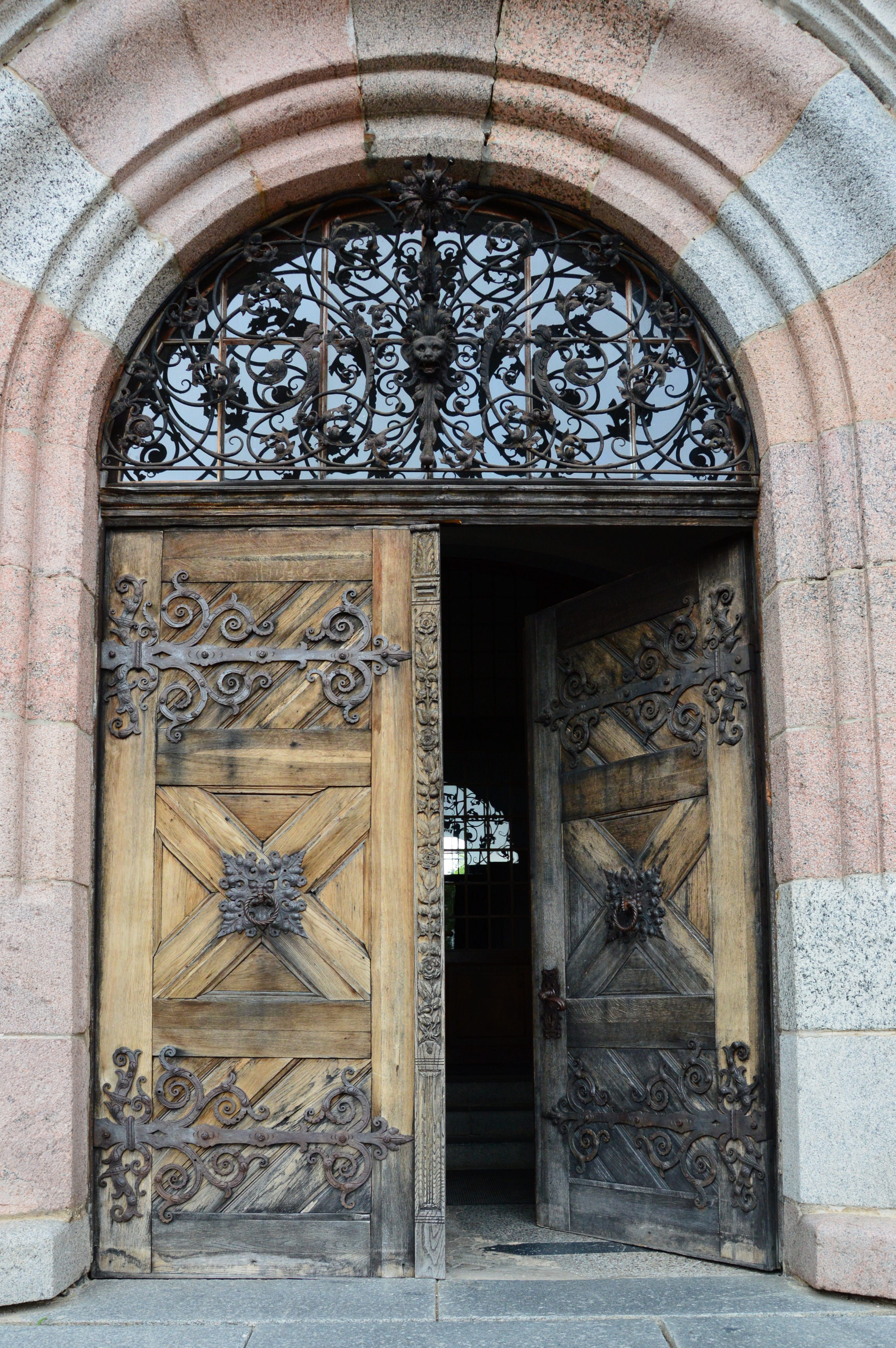 Cesvaine loss. Peasissepääs.